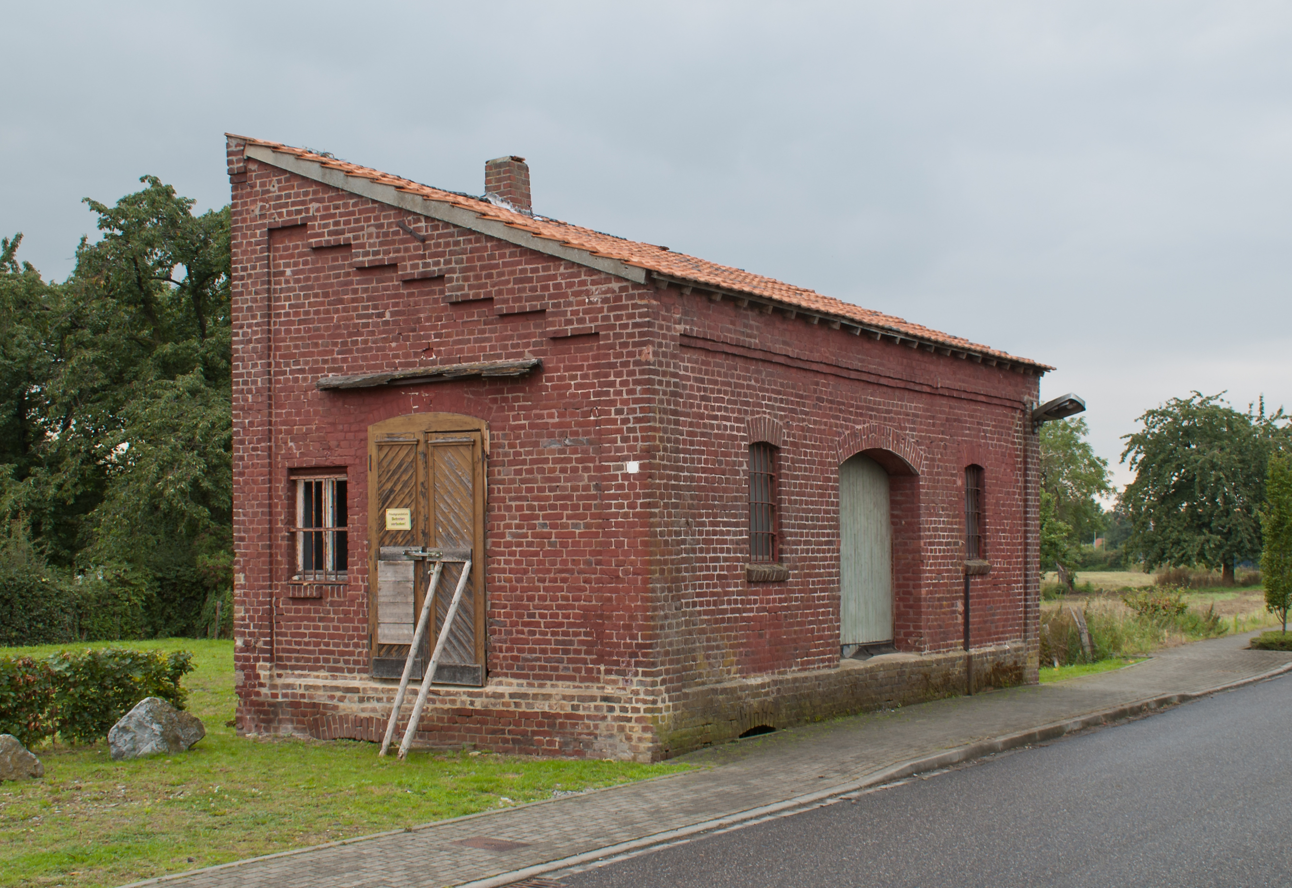 Betriebsgebäude der Geilenkirchener Kreisbahnen im Bereich des ehemaligen Bahnhofs Gangelt. Rechts neben dem Schuppen, im Verlauf der heutigen Straße, lagen die Bahnhofsgleise. Das Bauwerk ist das letzte originale betriebliche Gebäude der Geilenkirchener Kreisbahnen.